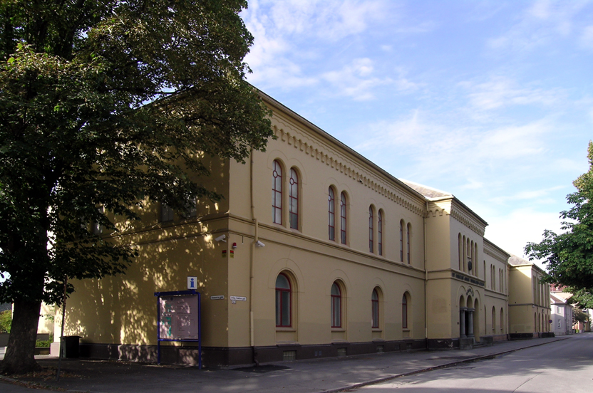 Vitenskapsmuseet, Erling Skakkes gate 47, Trondheim, Norway. Built as a library for Det Kongelige Norske Videnskabers Selskap, 1868. Architect: E.C.B. Christie.